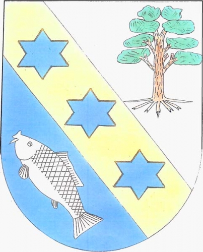 znak, Pozďatín, okres Třebíč